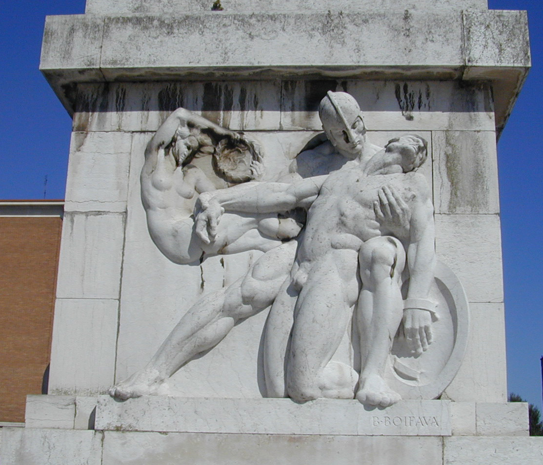 Monumento ai Caduti - MIBAC This is a photo of a monument which is part of cultural heritage of Italy.